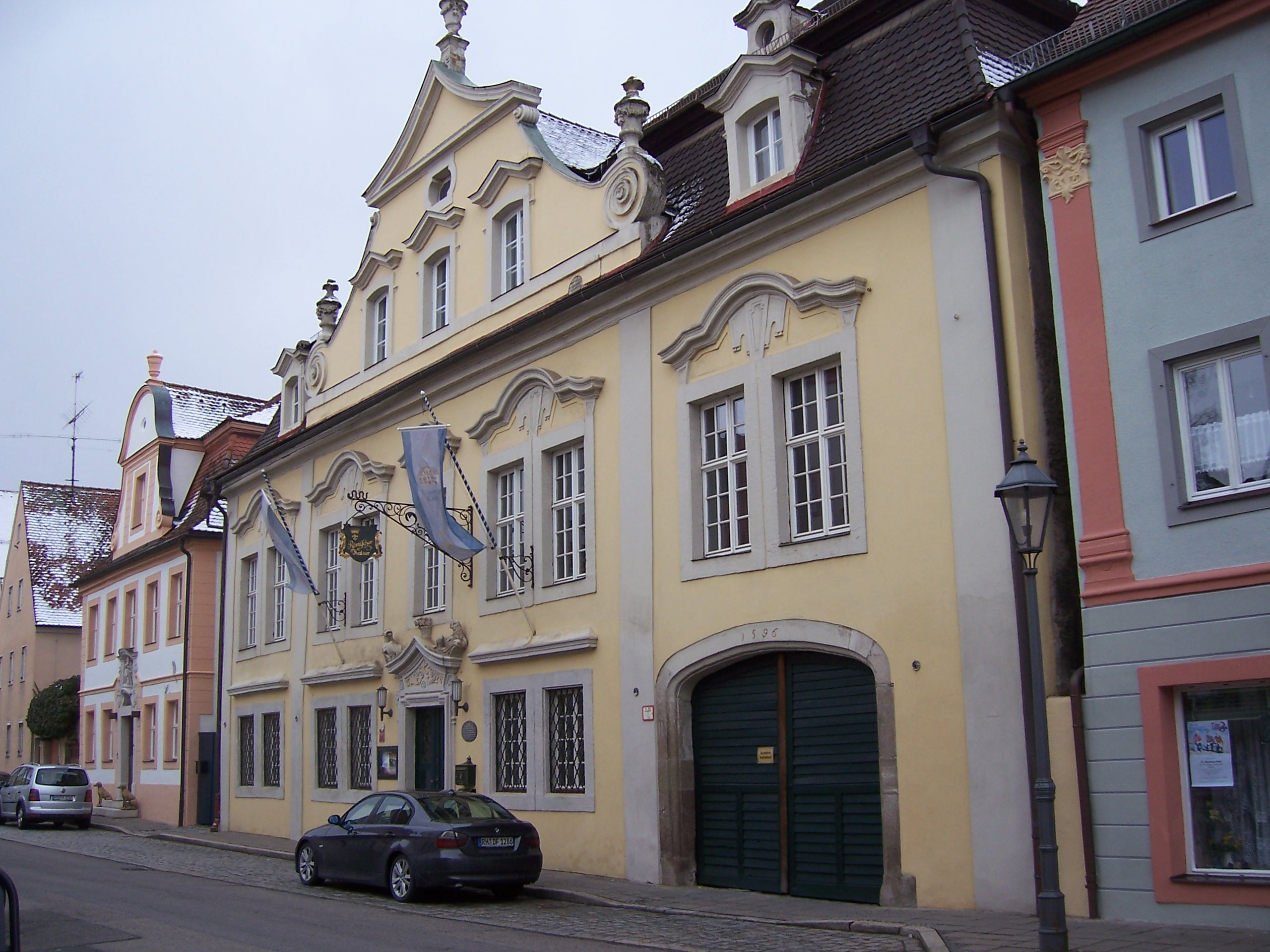 Ellingen_Weißenburger_Straße_15